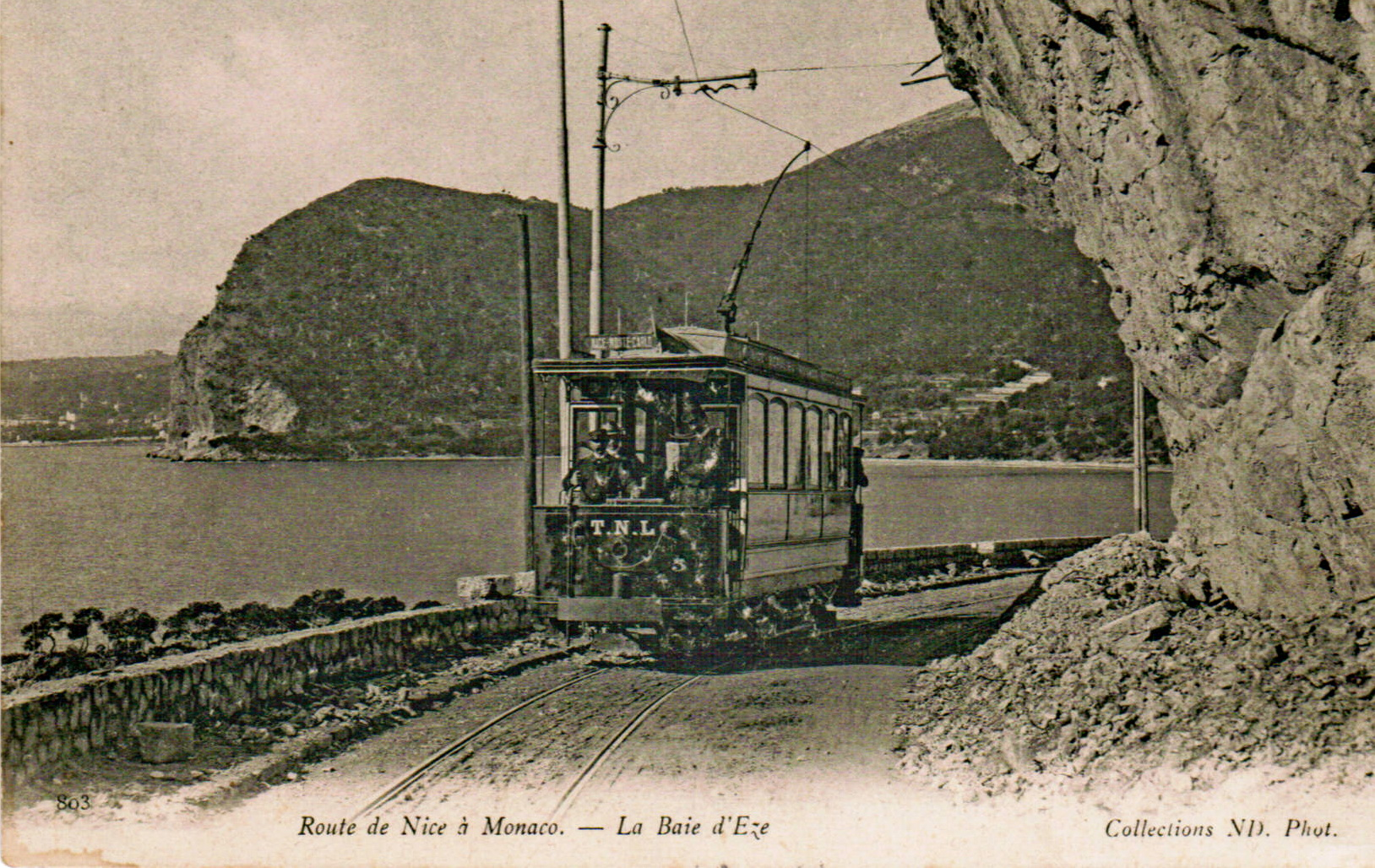 Carte postale ancienne éditée par ND Phot : Route de Nice à Monaco : La Baie d'Èze